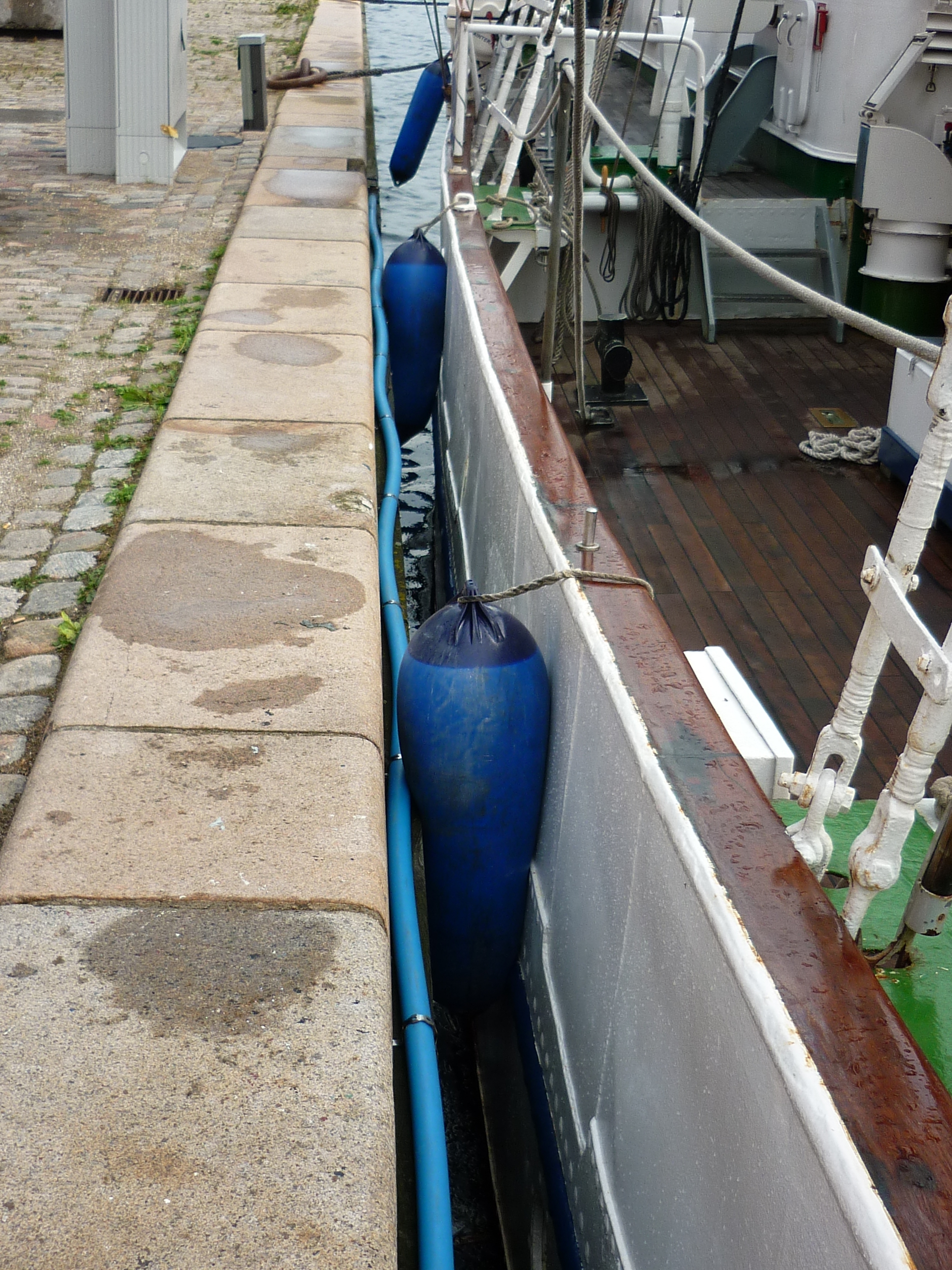 Fender (SSS Greif, Copenhagen)